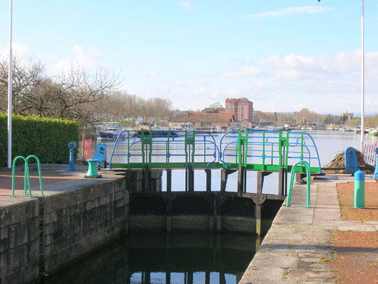 L'Ecluse du Canal à Roanne